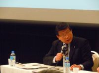 松崎公昭（総務副大臣として明日の安心対話集会に参加）